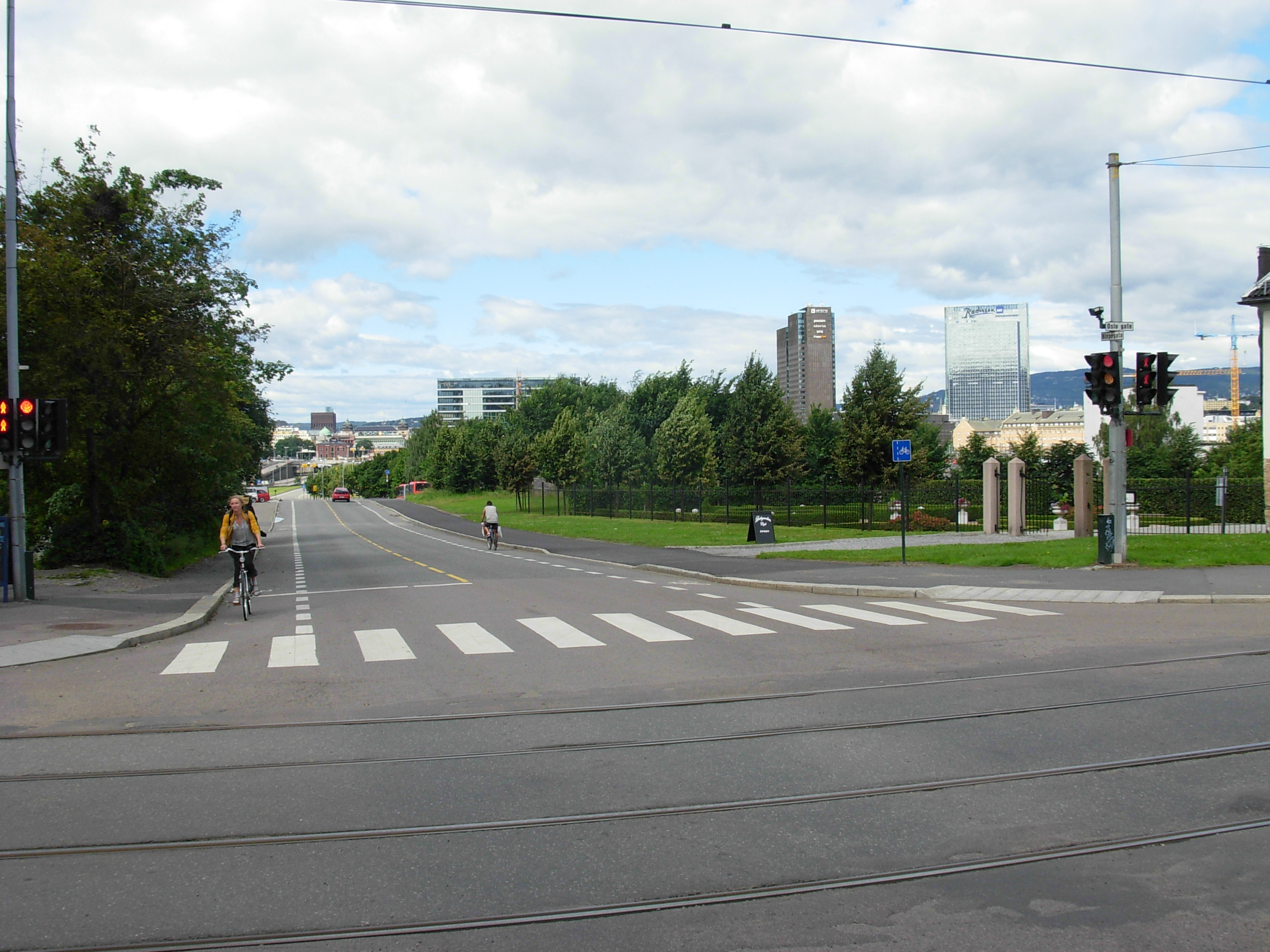 Bispegata, Gamlebyen, Oslo